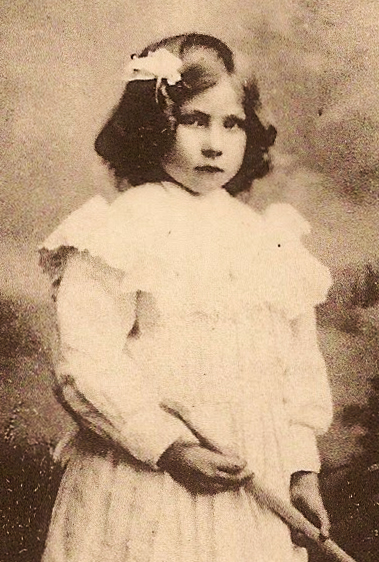 Jeanne Van Calck (1897-1906) assassinée en février 1906 dans le cadre du meurtre de la rue des Hirondelles à Bruxelles